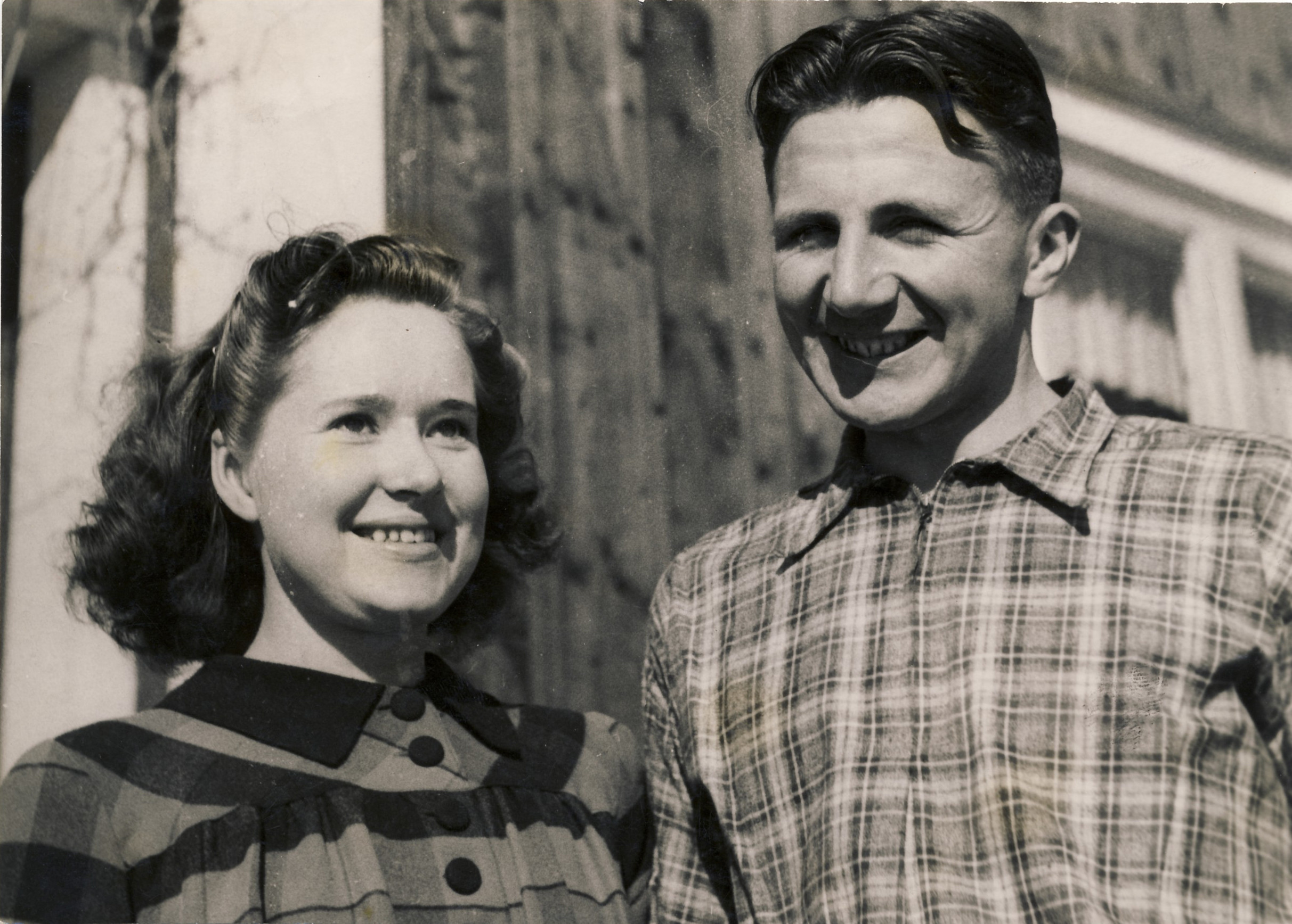 "Mora-Nisse"med sin fru Ulla-Britt.